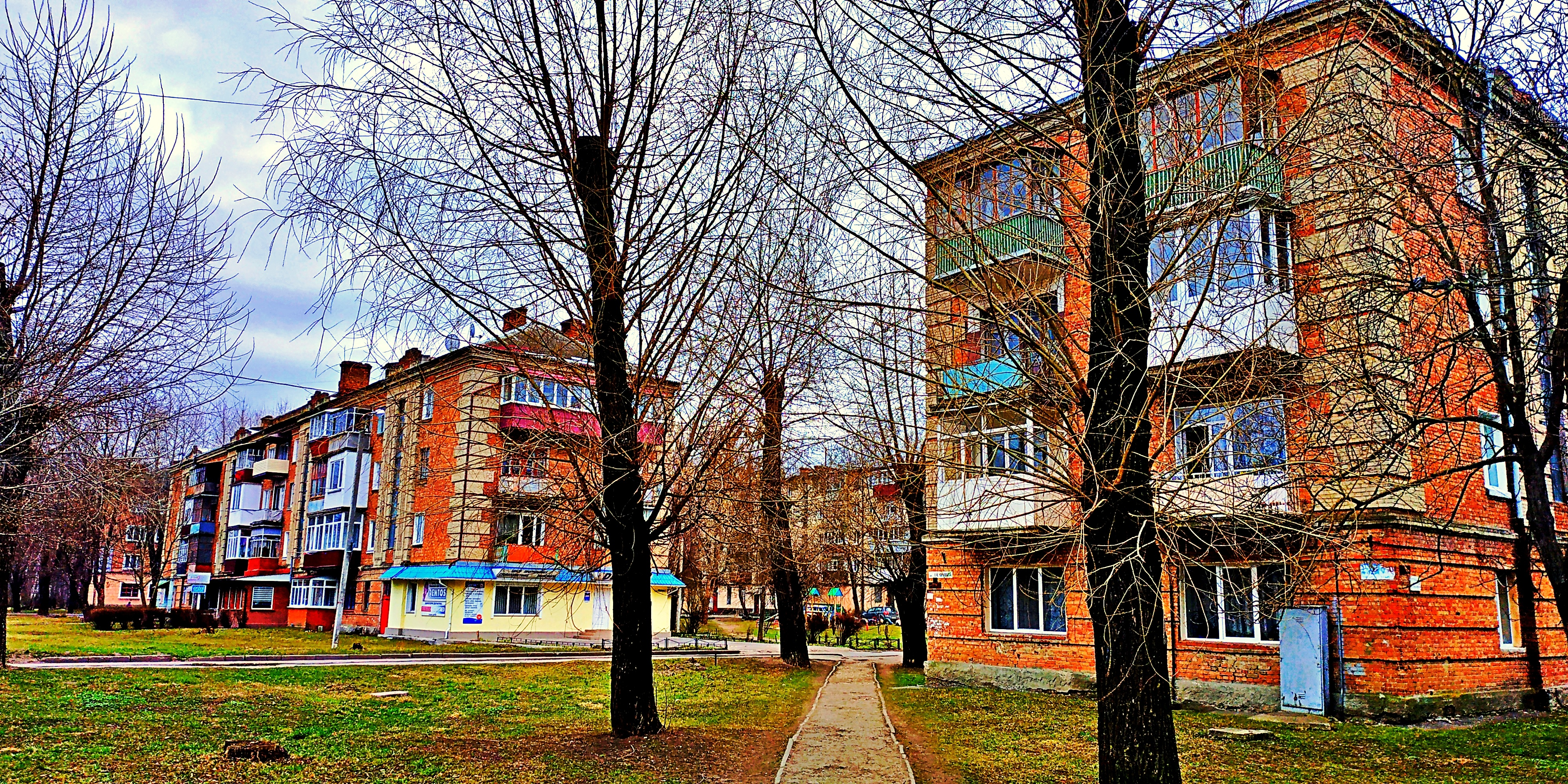 Житлові будинки сталінських часів ,побудовані у 1930-х рр. для сімей військовослужбовців військового містечка, яке розташовувалося у передмісті Проскурова - Ракове.